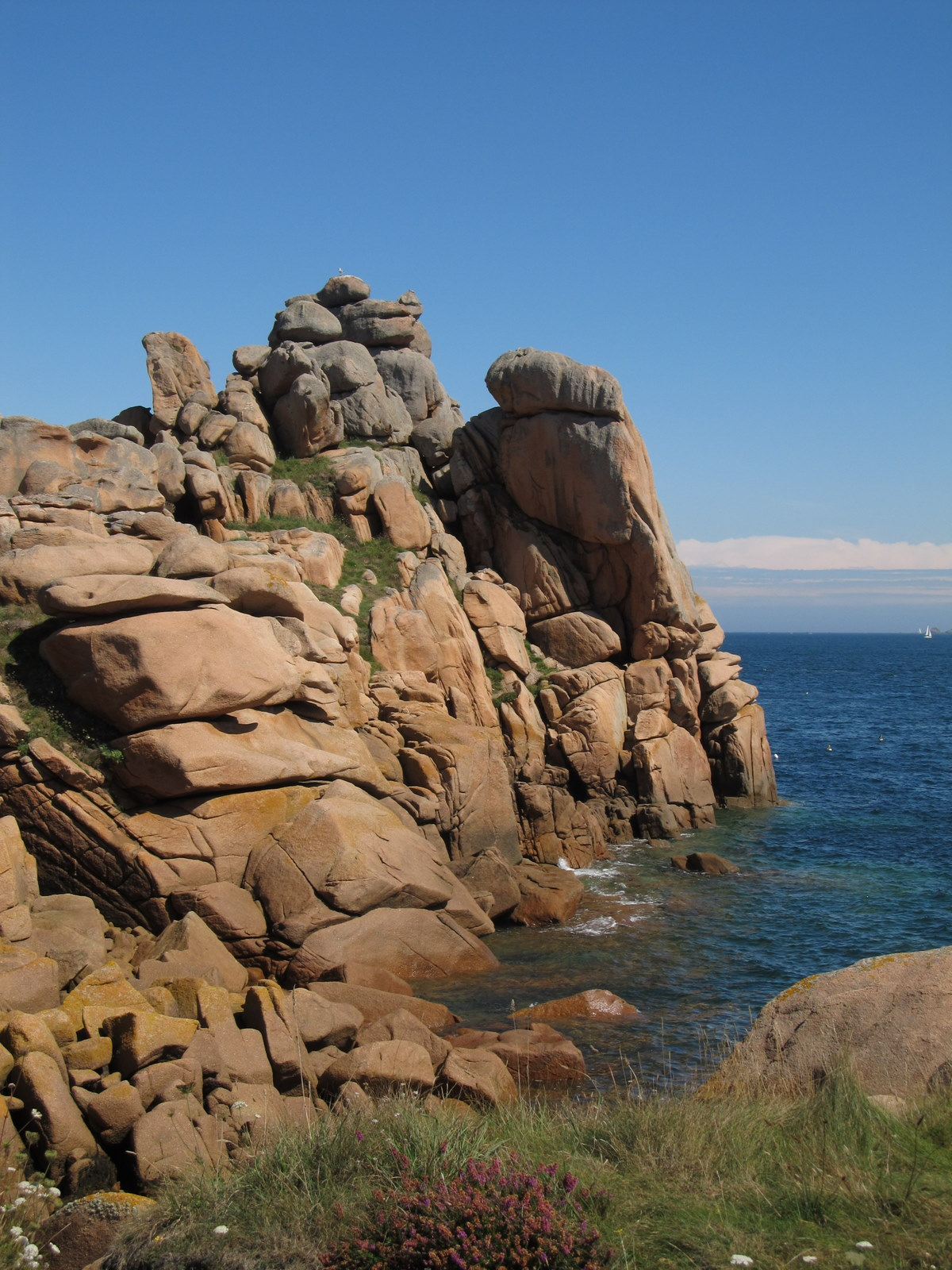 Ploumanac'h